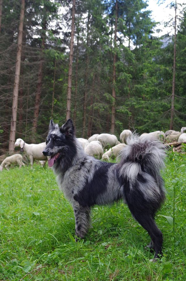 Pastore della Lessinia e del Lagorai dal mantello blue merle al lavoro su gregge